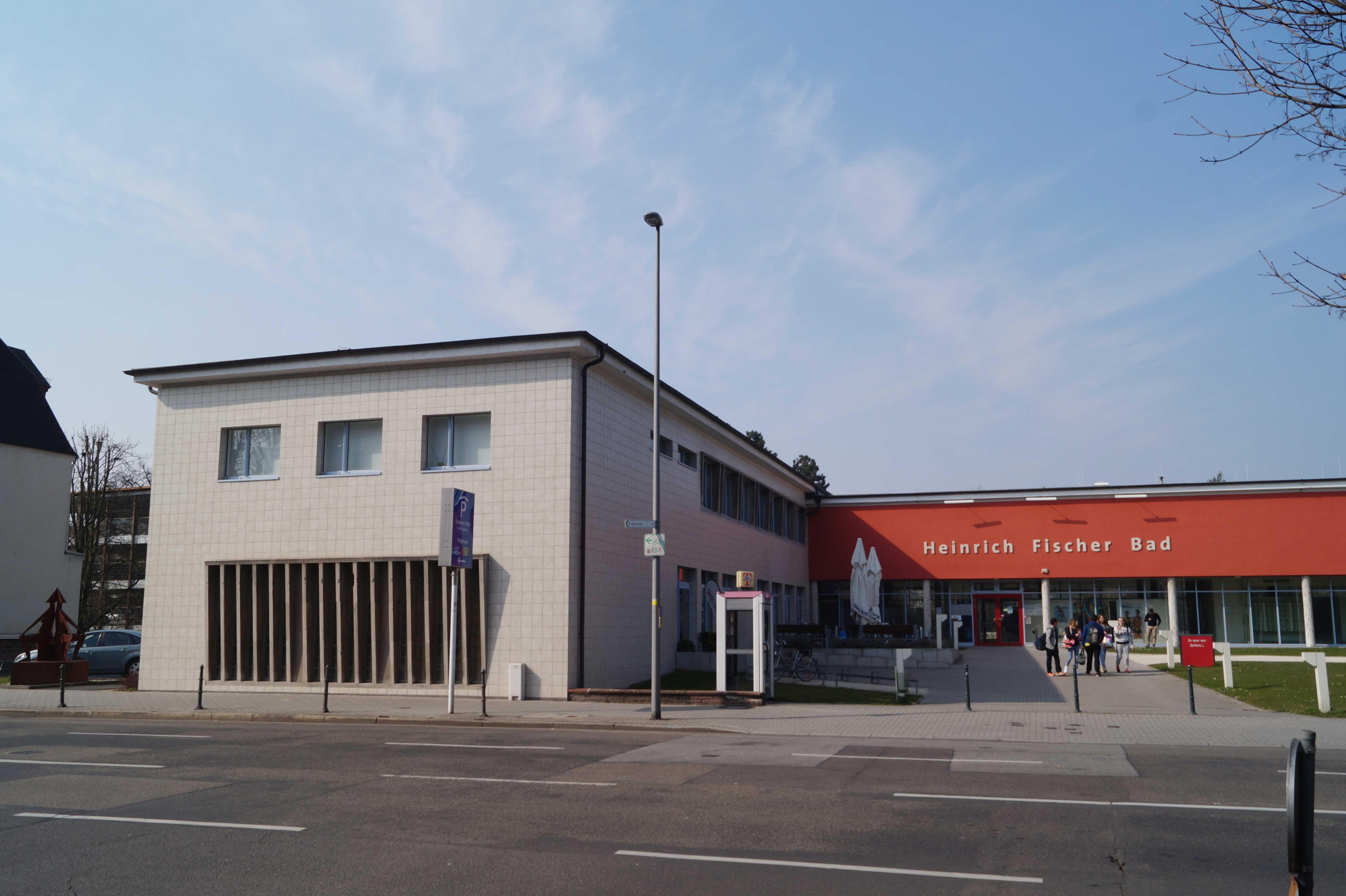 Hanau, Heinrich-Fischer-Bad, Ansicht des Saunatraktes und Eingangsbereiches von SO.